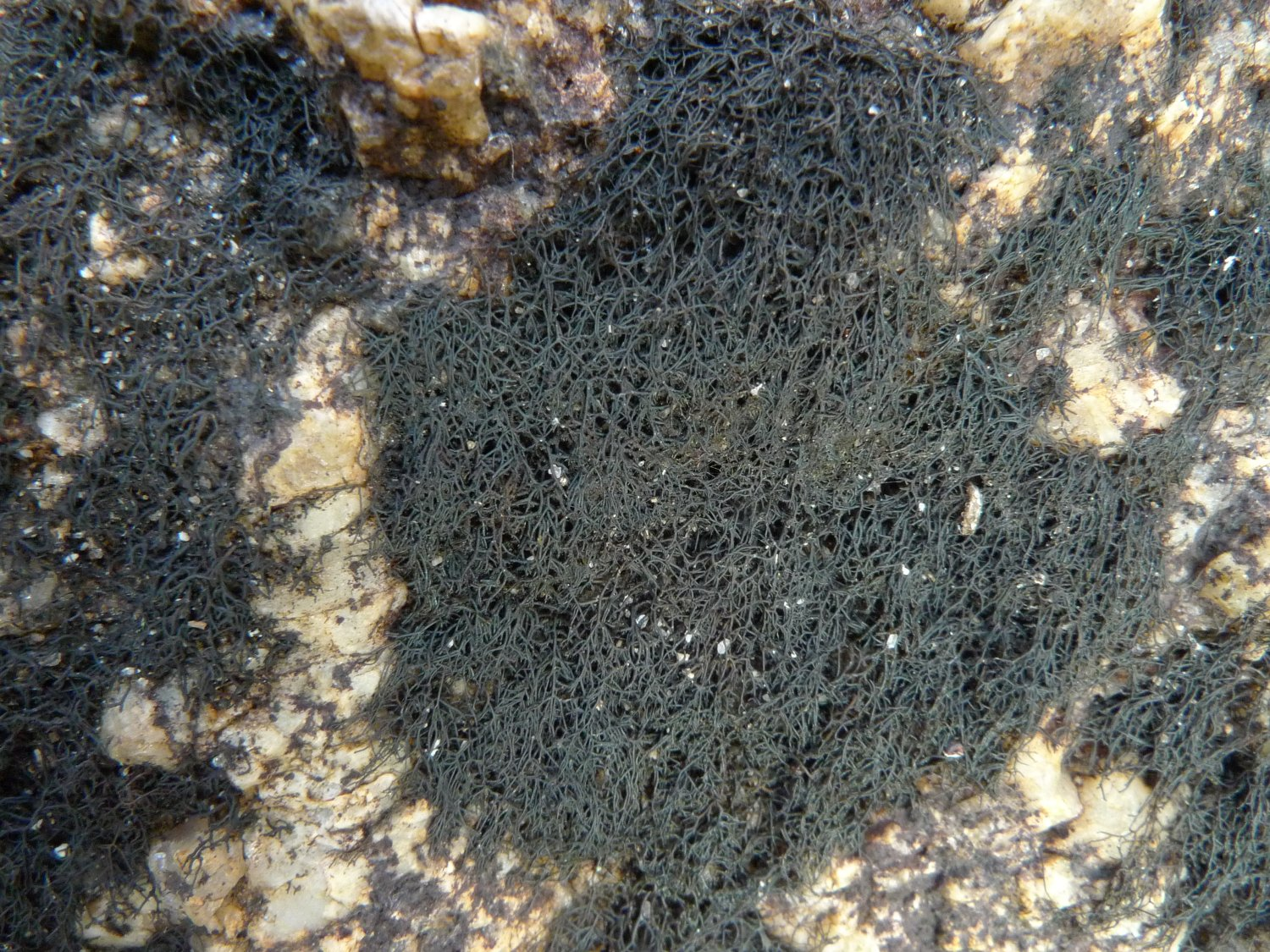 Ephebe lanata (St-Herbot, Loqueffret, Finistère, Bretagne, France)